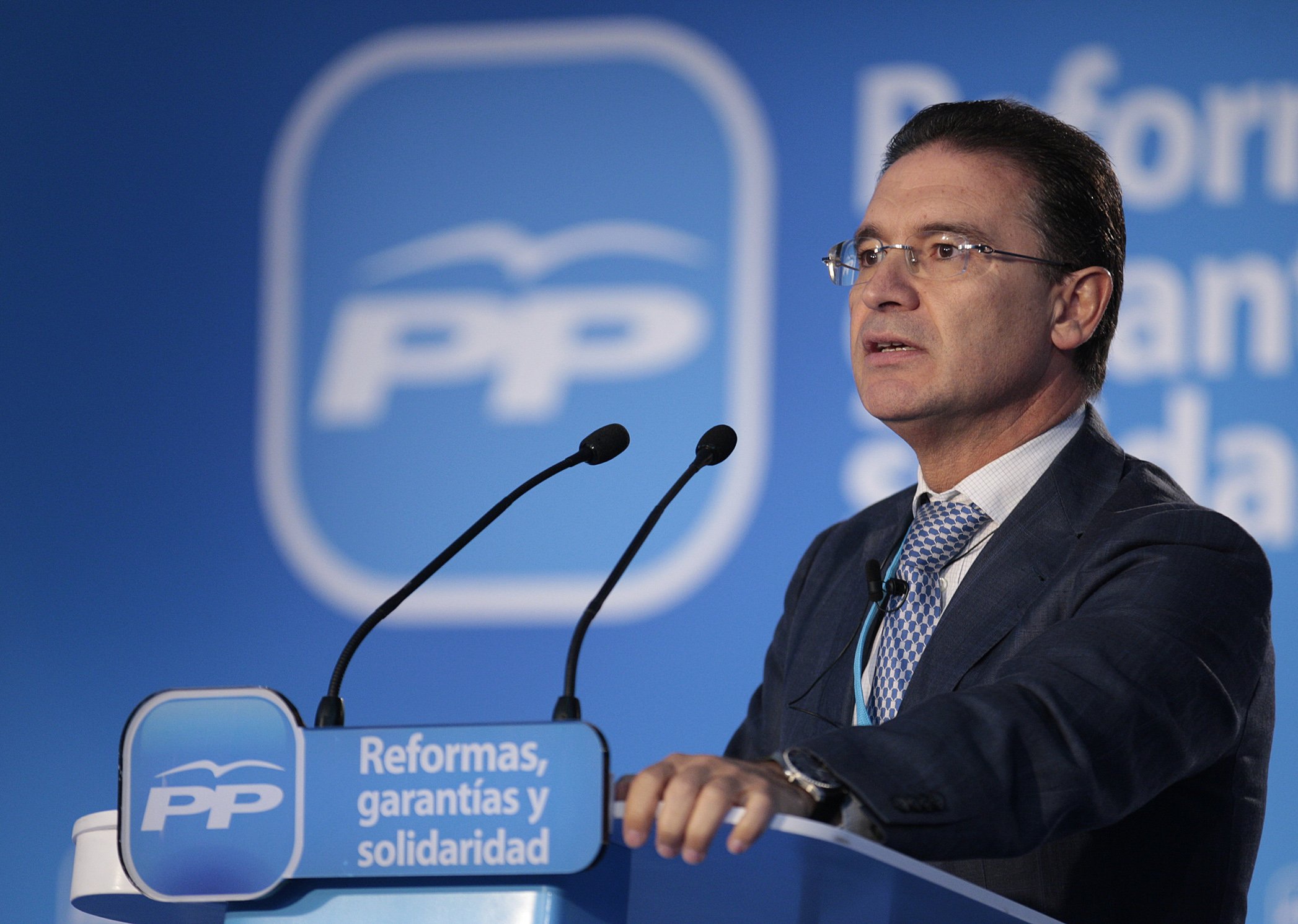 Serafín Castellano a unes jornades del Partit Populaer l'estiu de 2012 a Gandia